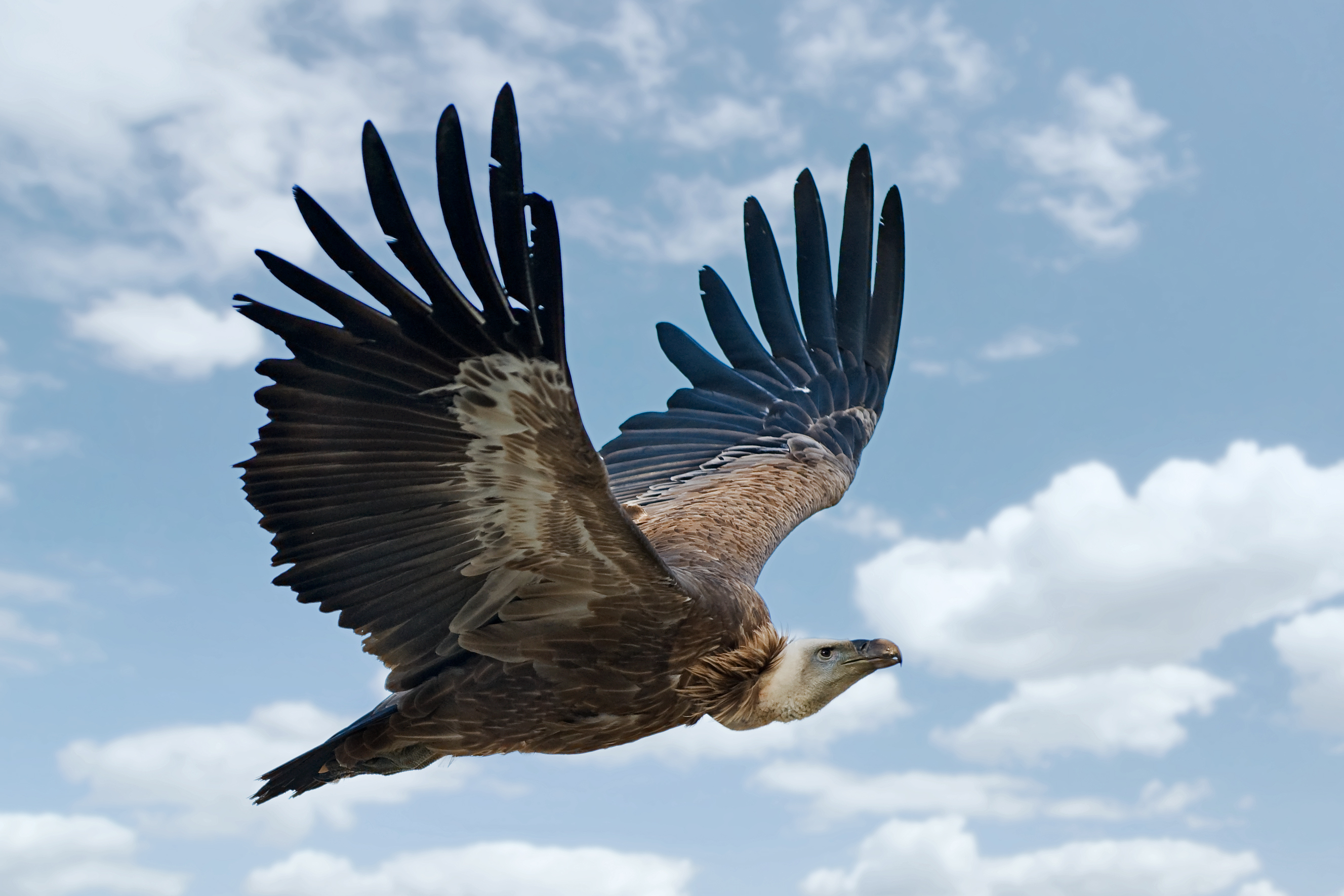 Gänsegeier im Vorbeiflug, aufgenommen im Zoo d'Amnéville(F) bei einer Flugshow.